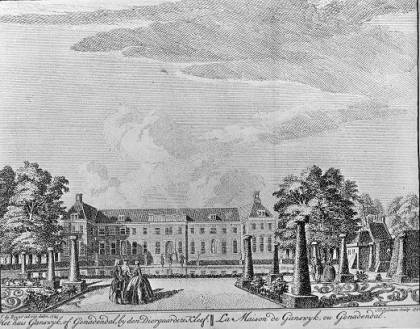 Kupferstich mit einer Ansicht des Schlosses Gnadenthal in Kleve-Donsbrüggen